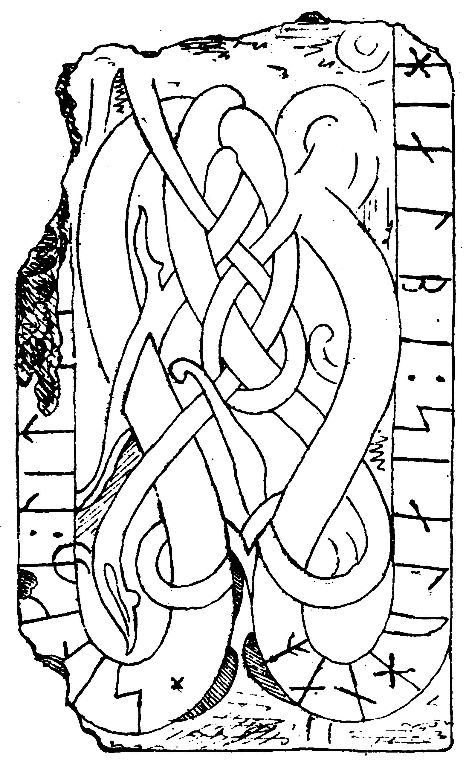 Ena halvan av Östergötlands runinskrifter 102, hittad 1860 i prästgårdstrappan i Kaga socken. Teckning i "Utdrag af Antiqvitets-Intendenten P. A. Säves afgifna berättelse för år 1861", publicerad i Antiqvarisk tidskrift för Sverige band 1, 1864.